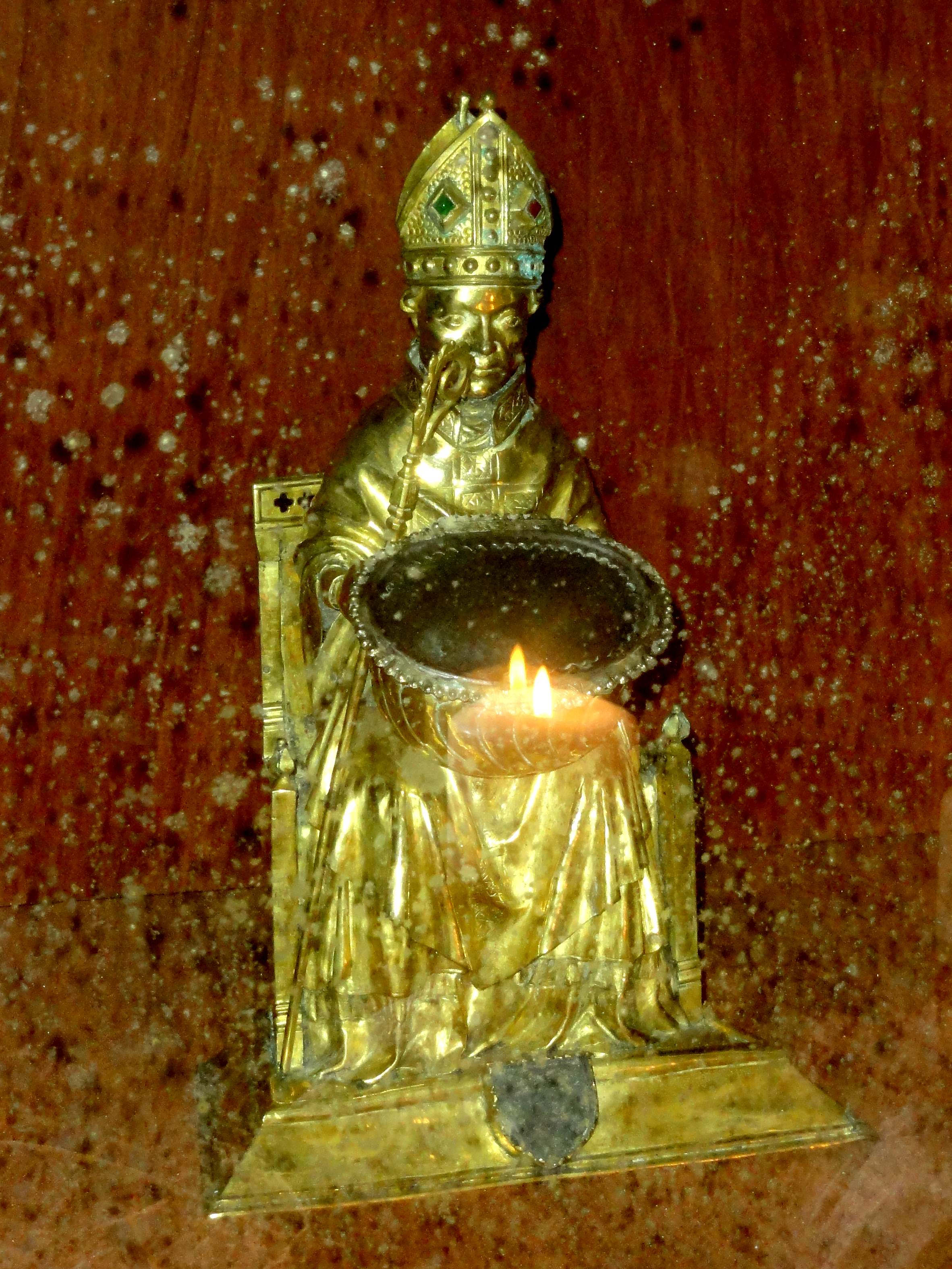 Statuette-reliquaire de saint Vivien, cuivre doré, XIVe siècle.